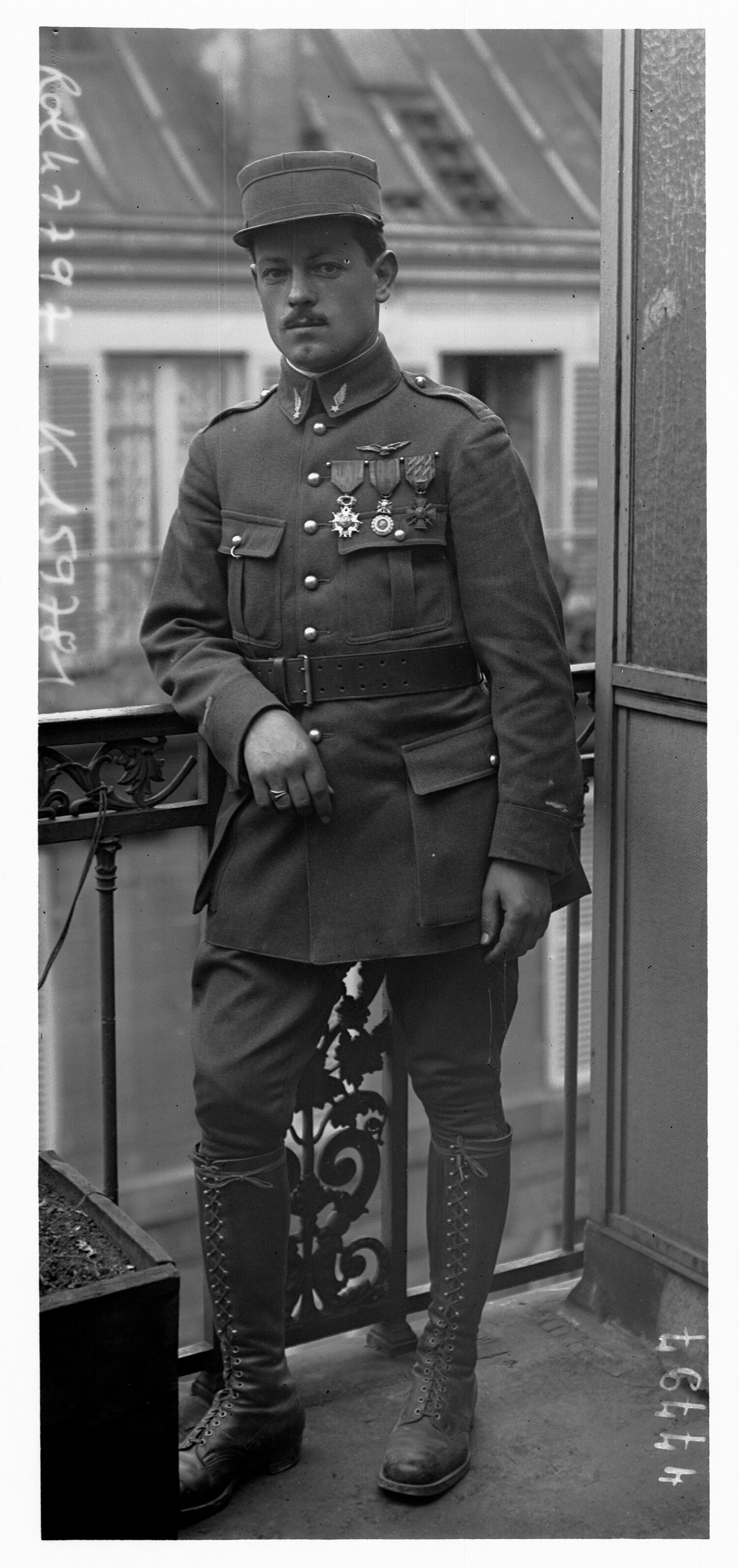 J'ai recadré avec GIMP et enlevé l'écriture en encre blanc sur l'image. Titre : Lenoir : [photographie de presse] / [Agence Rol] Auteur : Agence Rol. Agence photographique Date d'édition : 1916 Sujet : Lenoir, Maxime (1888-1916) -- Portraits Type : Portraits -- 1914-1945,image fixe,photographie Langue : Français Format : 1 photogr. nég. sur verre ; 13 x 18 cm (sup.) Format : image/jpeg Droits : domaine public Identifiant : ark:/12148/btv1b6952247z Source : Bibliothèque nationale de France, département Estampes et photographie, EI-13 (515) Relation : Description : Référence bibliographique : Rol, 47797 Provenance : bnf.fr Date de mise en ligne : 22/02/2011